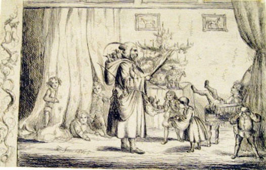 "A chegada do Pai Natal", desenho, em água forte, de 1848, por D. Fernando II, o "Rei-Artista".